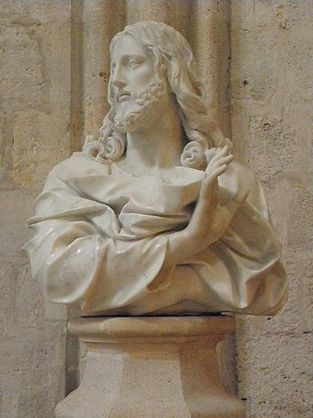 Salvator mudi. Buste du Christ de la cathédrale Notre-Dame de Sées (61).